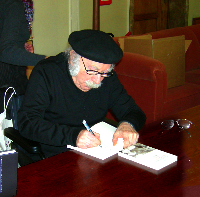 Feier zu Ehren des Schriftstellers Edgar Hilsenrath zu seinem 80. Geburtstag. Rathaus Schöneberg in Berlin.